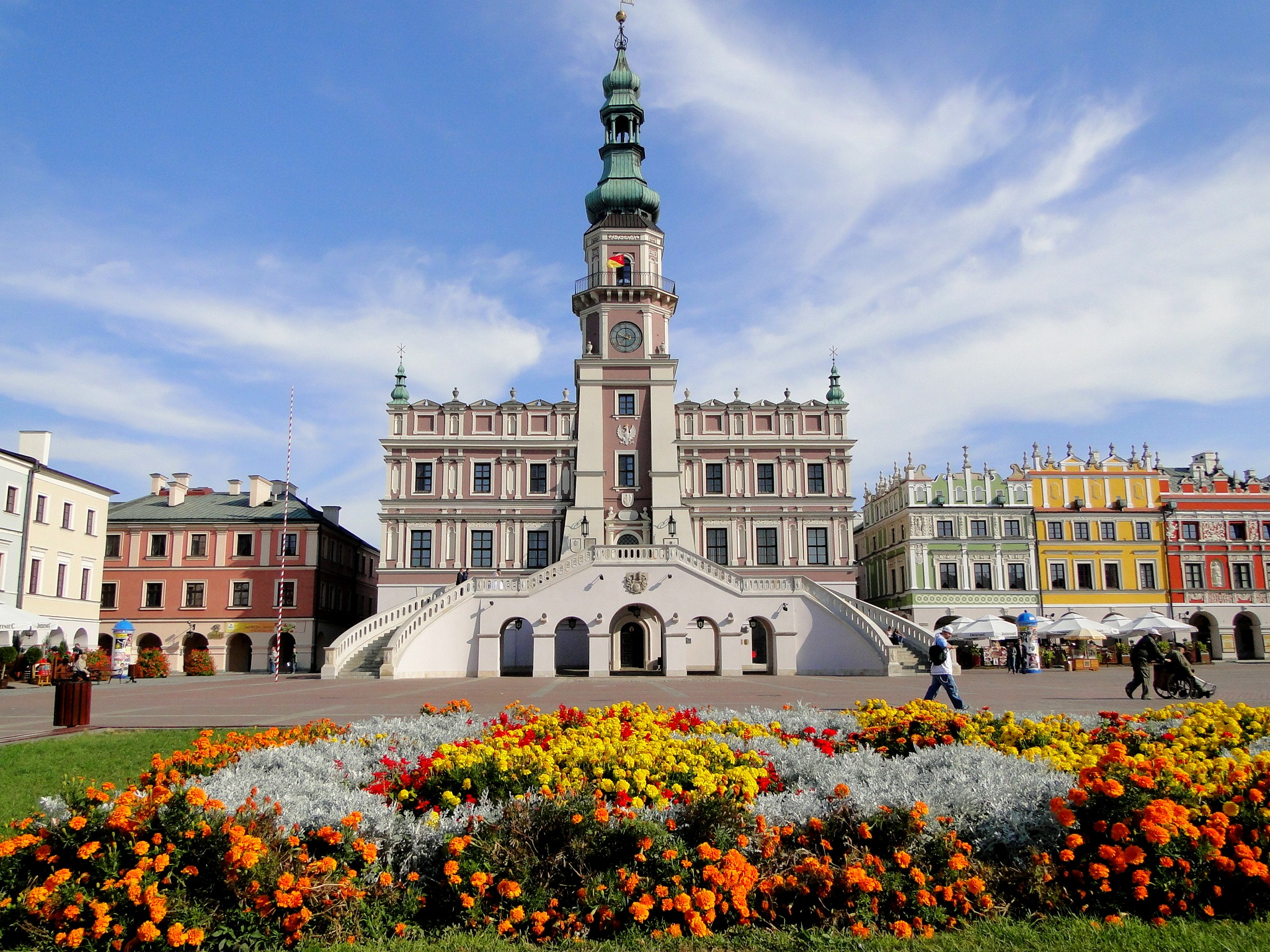 Ratusz w Zamościu.